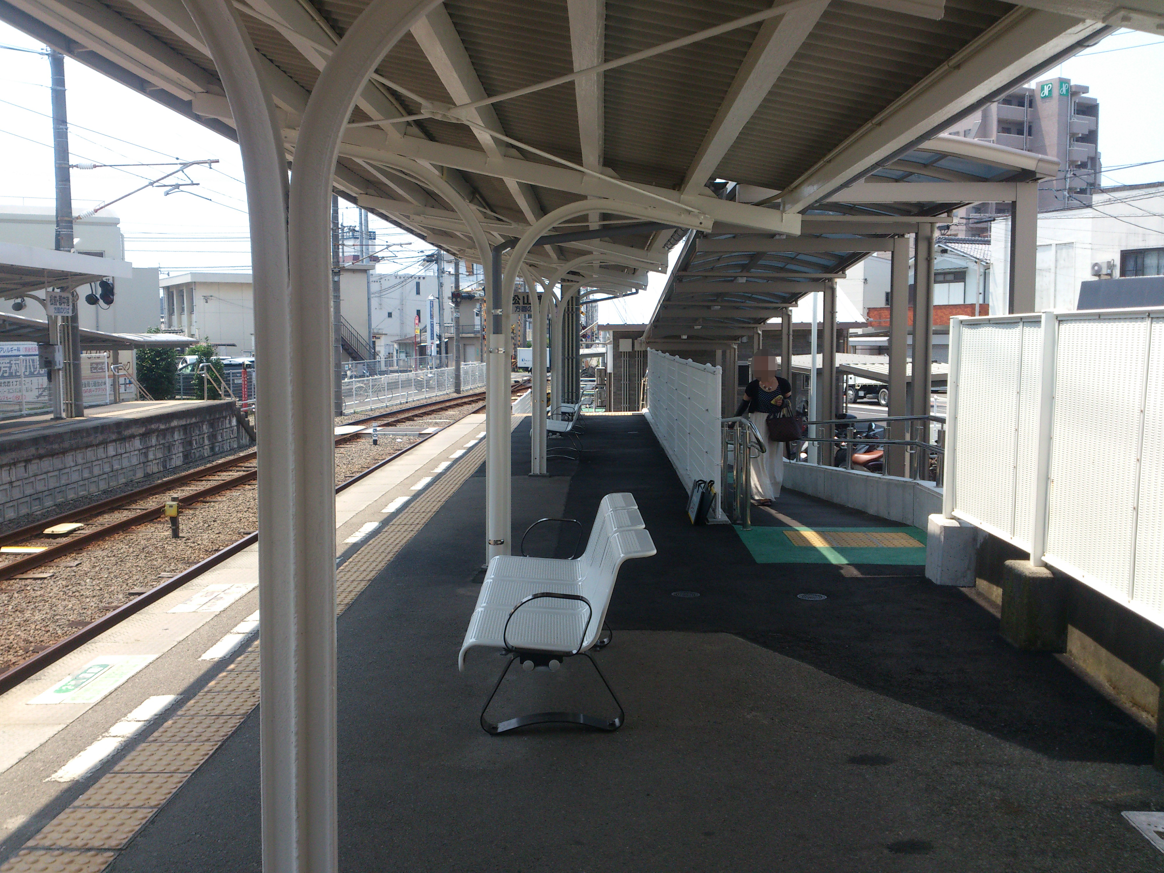 伊予鉄道 余戸駅のホームです。